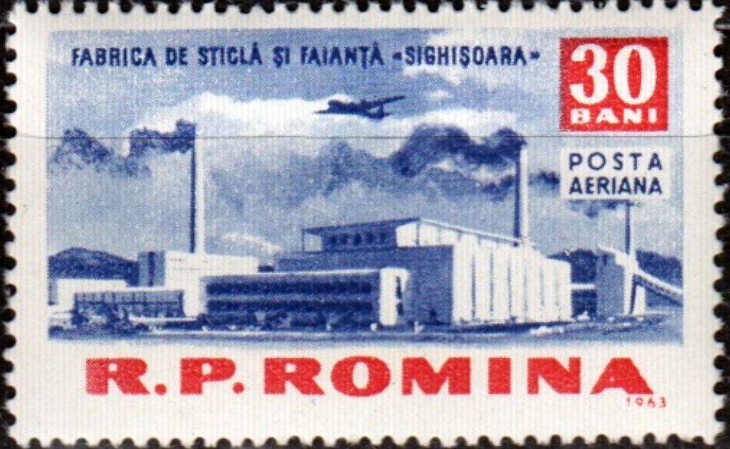 Fabrica de sticla si faianta Sighisoara